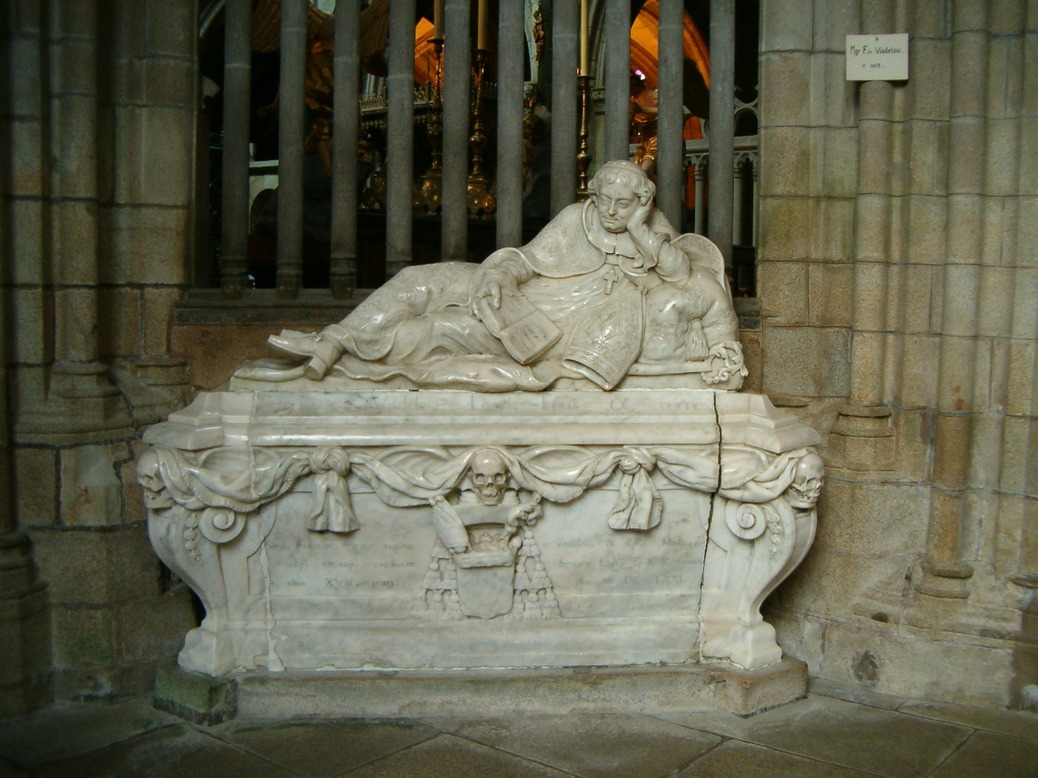 Tombeau de Mgr François de Visdelou par N. de La Colonge, XVIIIème siècle, en la cathédrale Saint-Paul-Aurélien de Saint-Pol-de-Léon (29).